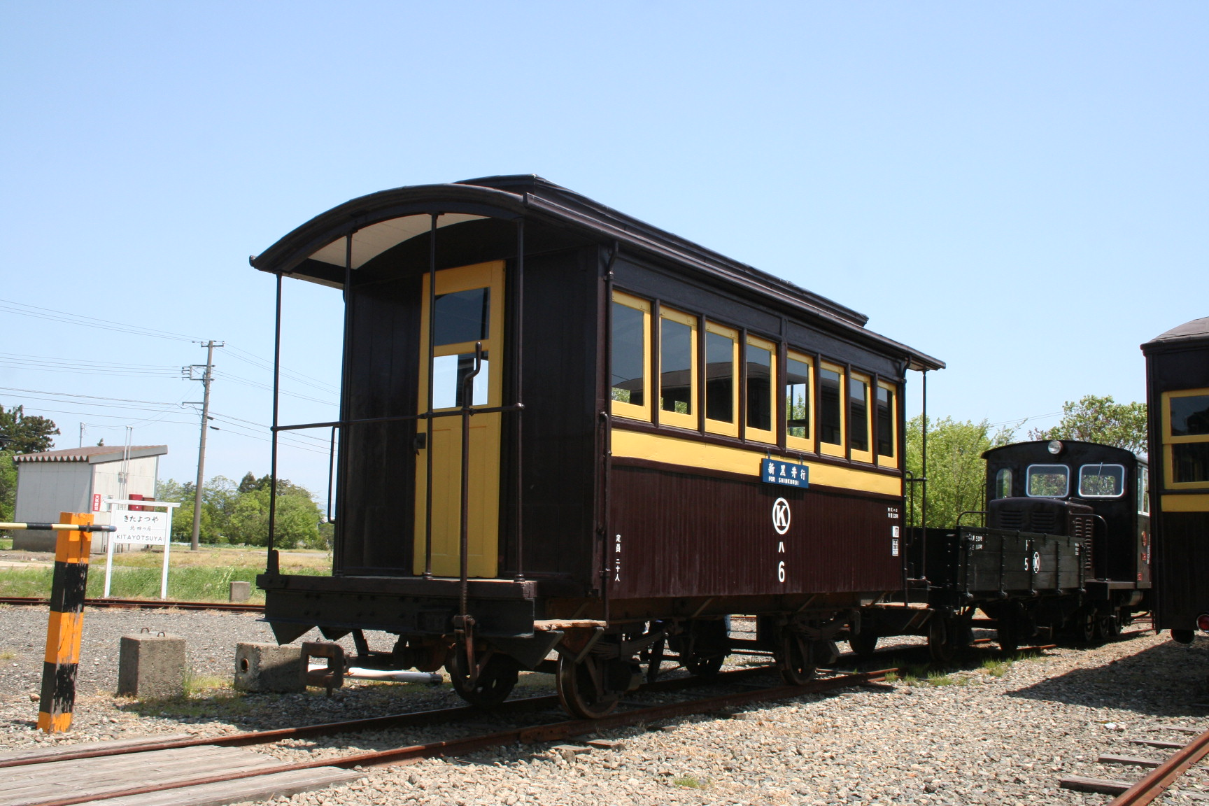 2018年5月5日撮影